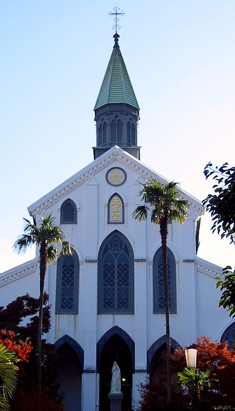 Oura Church, Nagasaki, Nagasaki, Japan